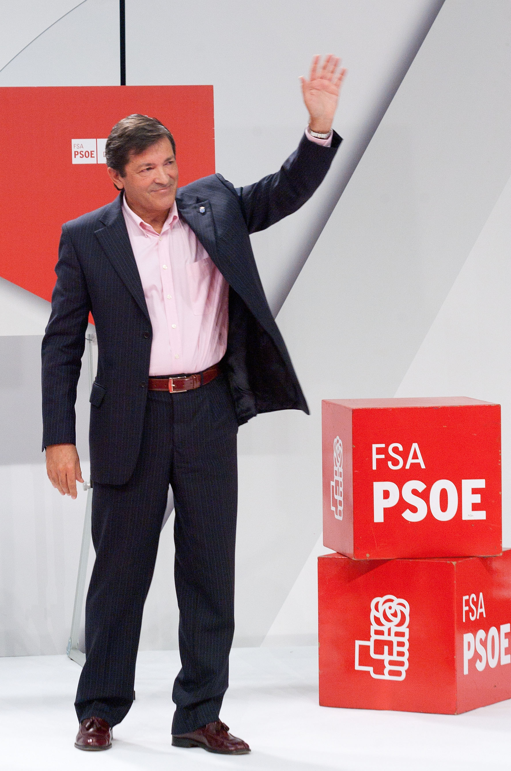 Acto político de Javier Fernández en Mieres (Asturias).